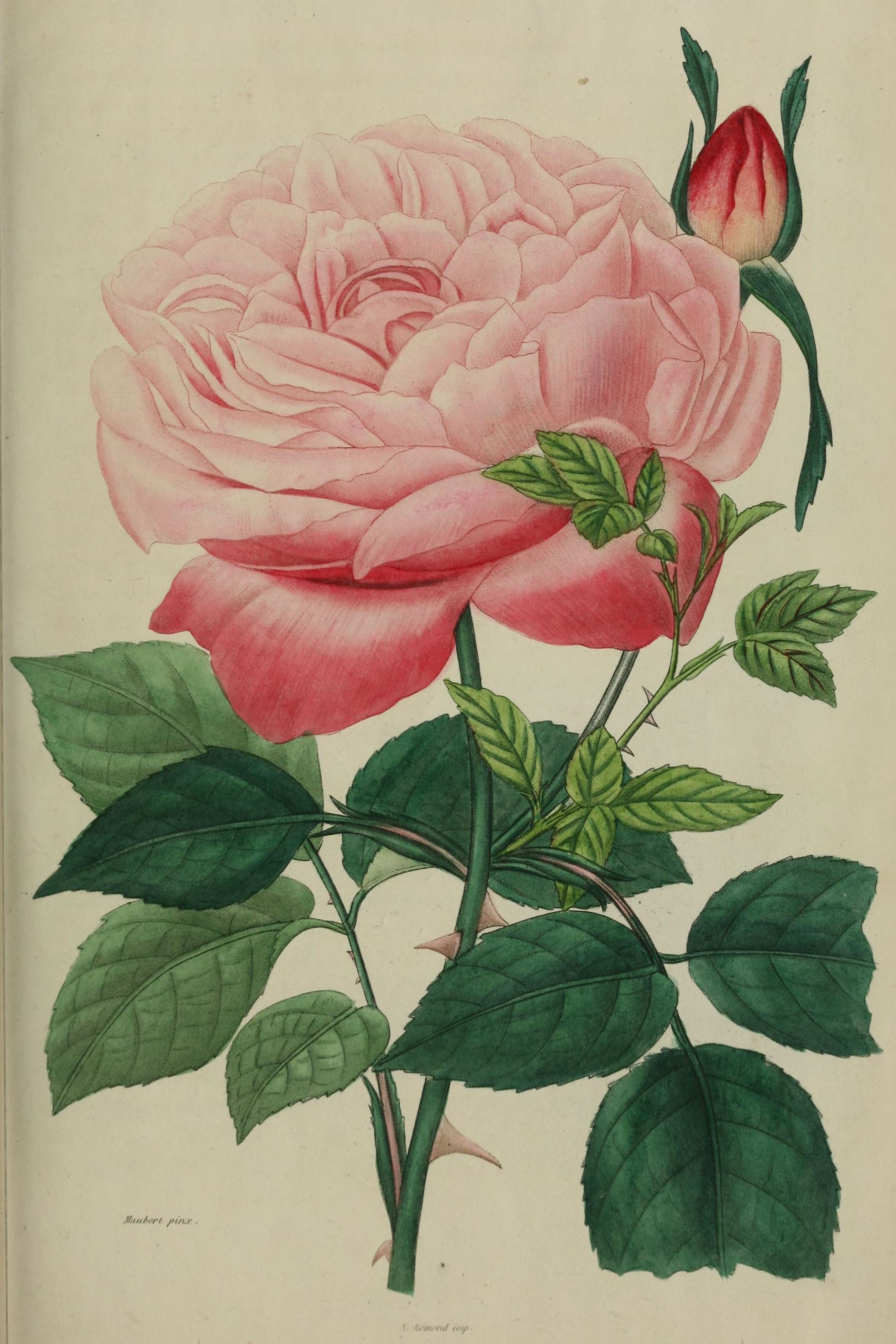 Rosa ‘Comte de Paris’. Herbier General de l'Amateur.